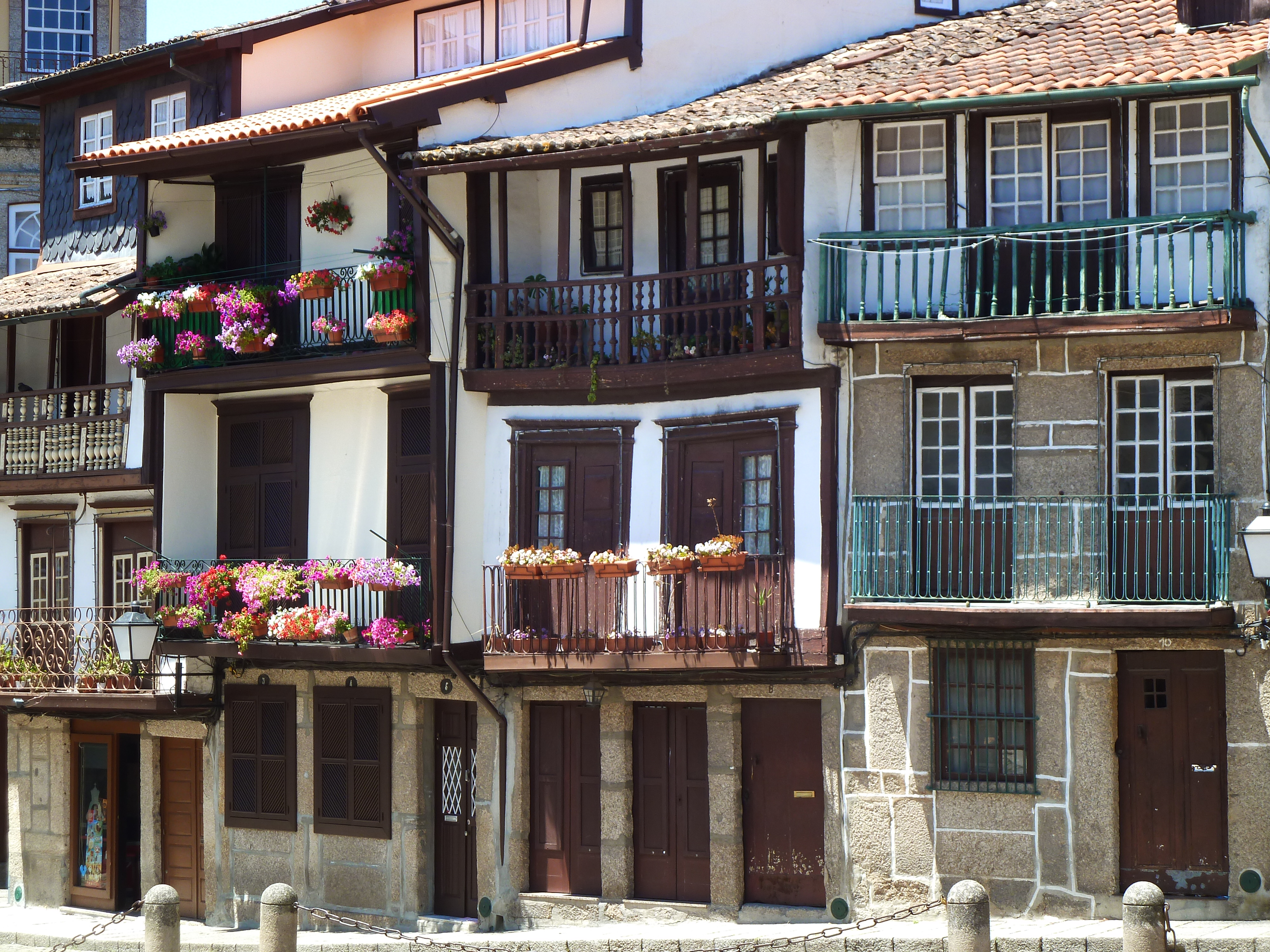 Portogallo, Guimaraes: il borgo (Praça de S. Tiago)